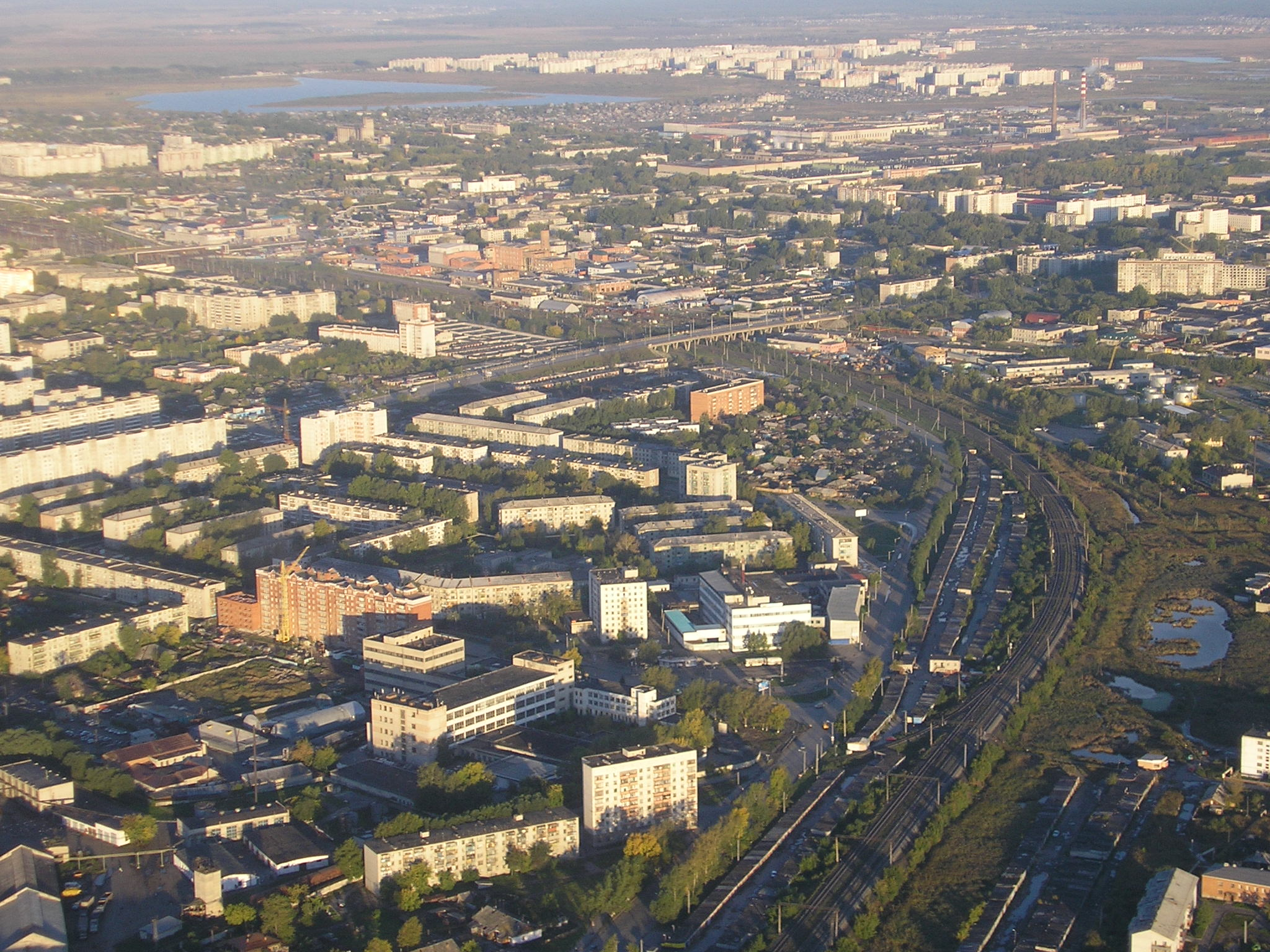 город Курган, панорама, 2005 г.